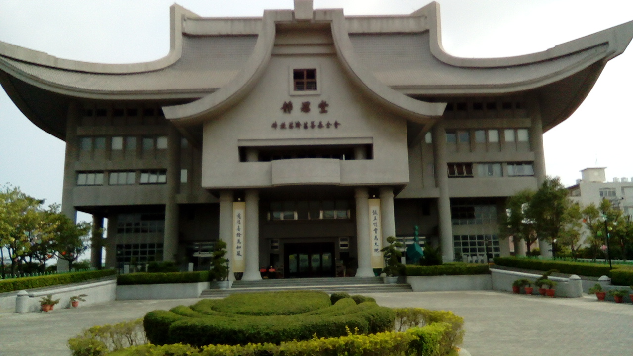 慈濟集團相關建設